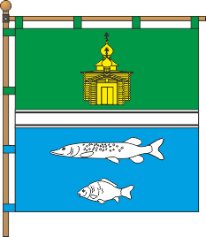 Прапор села Лиманське (Ренійський район)